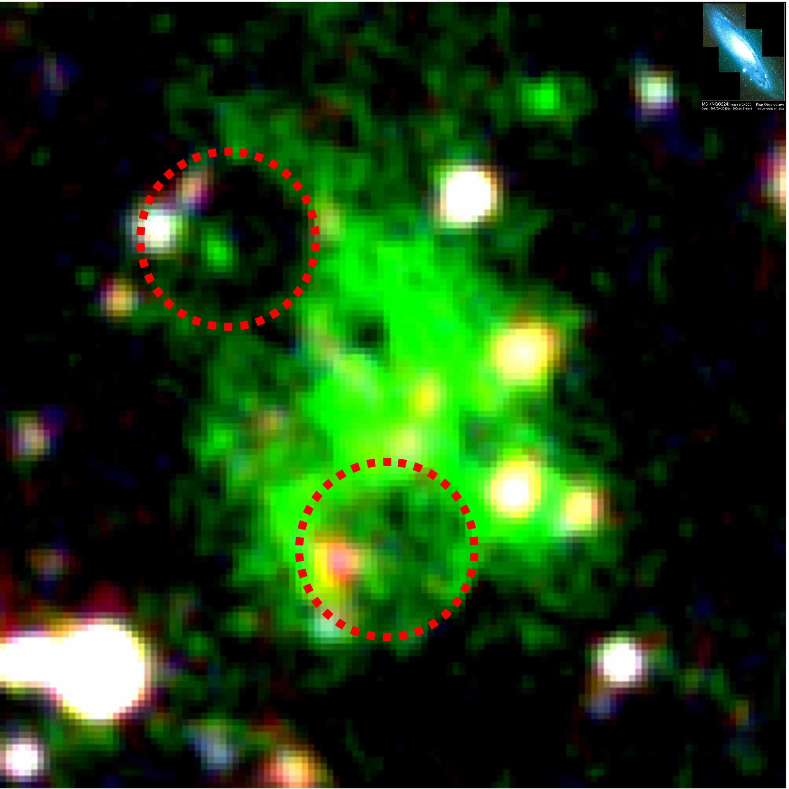 SSA-22